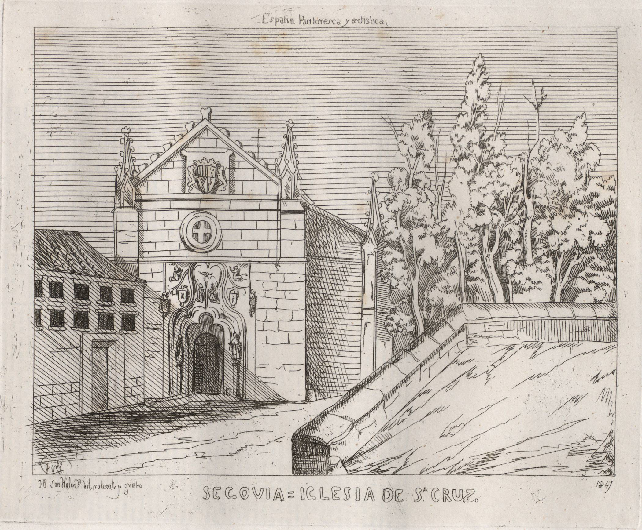 Segovia [Material gráfico]: Iglesia de Sª Cruz / F. P. Van Halen, dº de natural y grabó.